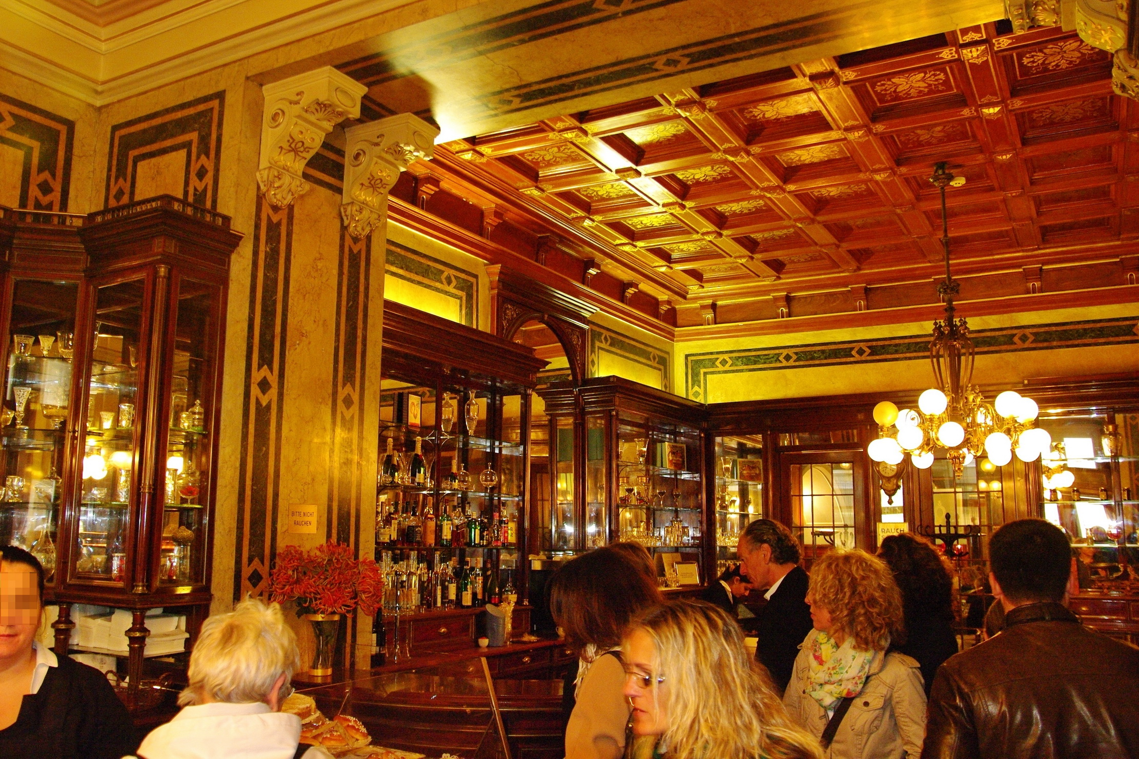 Zuckerbäckerei Demel Shop